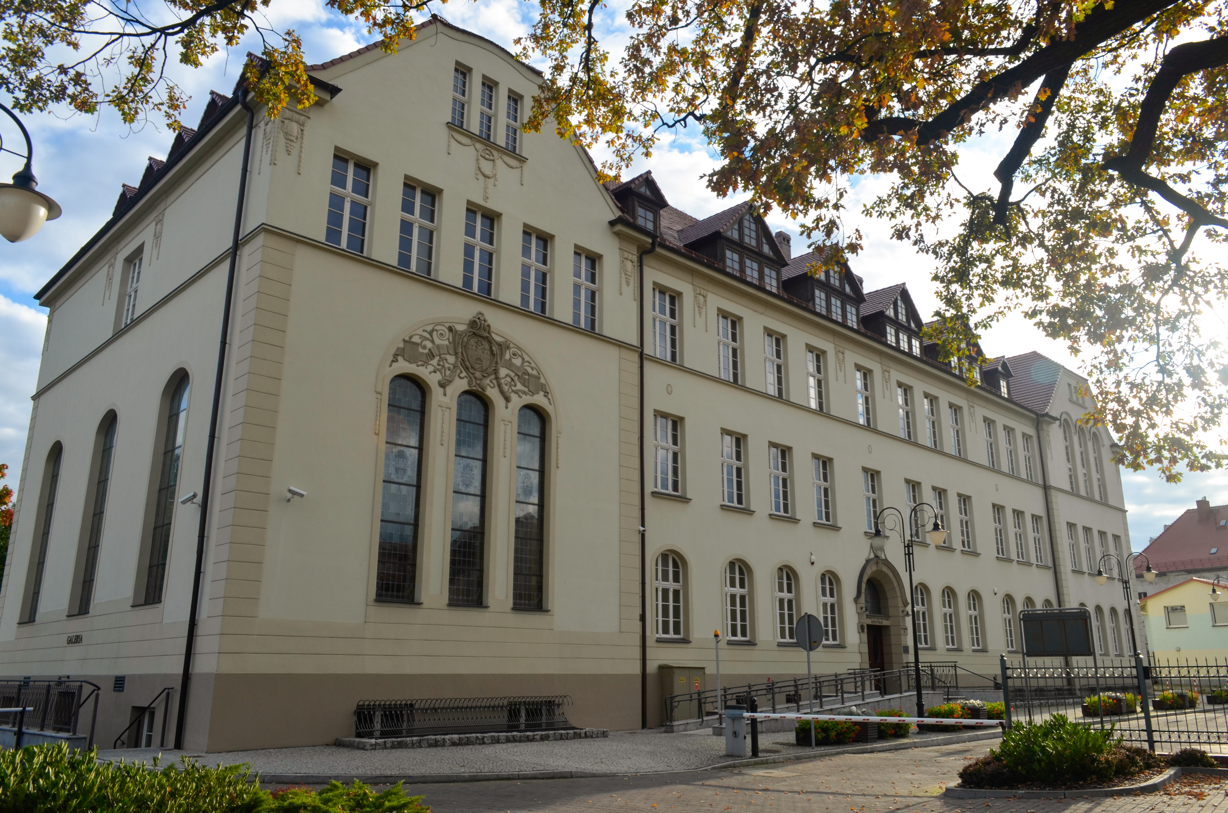 Zielona Góra, liceum żeńskie, ob. szkoła, 1909-1911